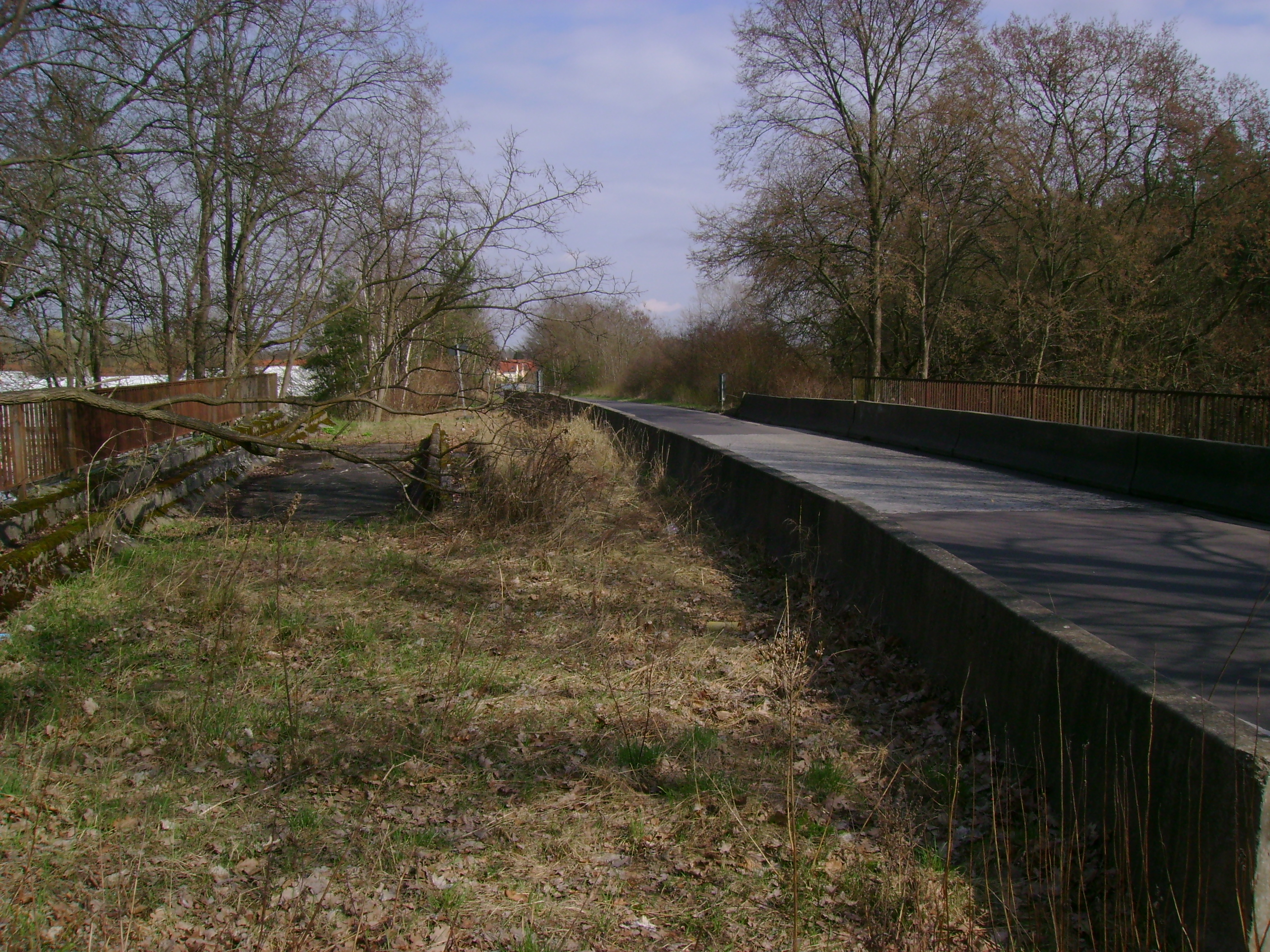 Brücke der "Heinkelchaussee" in Germendorf. Auf der linken Brückenseite ist das ehemalige Gleisbett der Bahnstrecke Oranienburg-Velten. Die Brücke wurde im Oktober 2012 abgerissen.